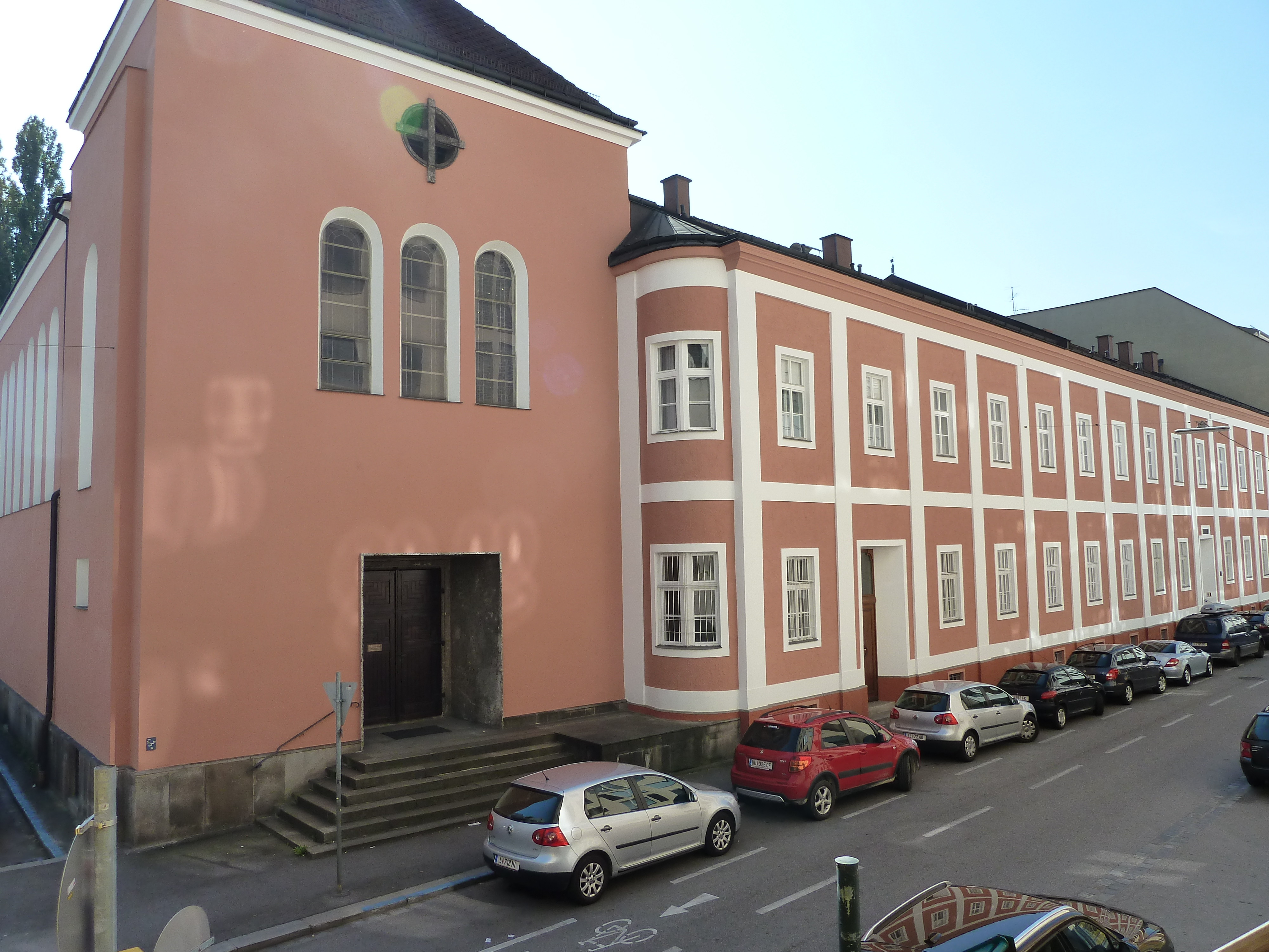 Karmelitinnenkloster und Kirche Unbefleckte Empfängnis